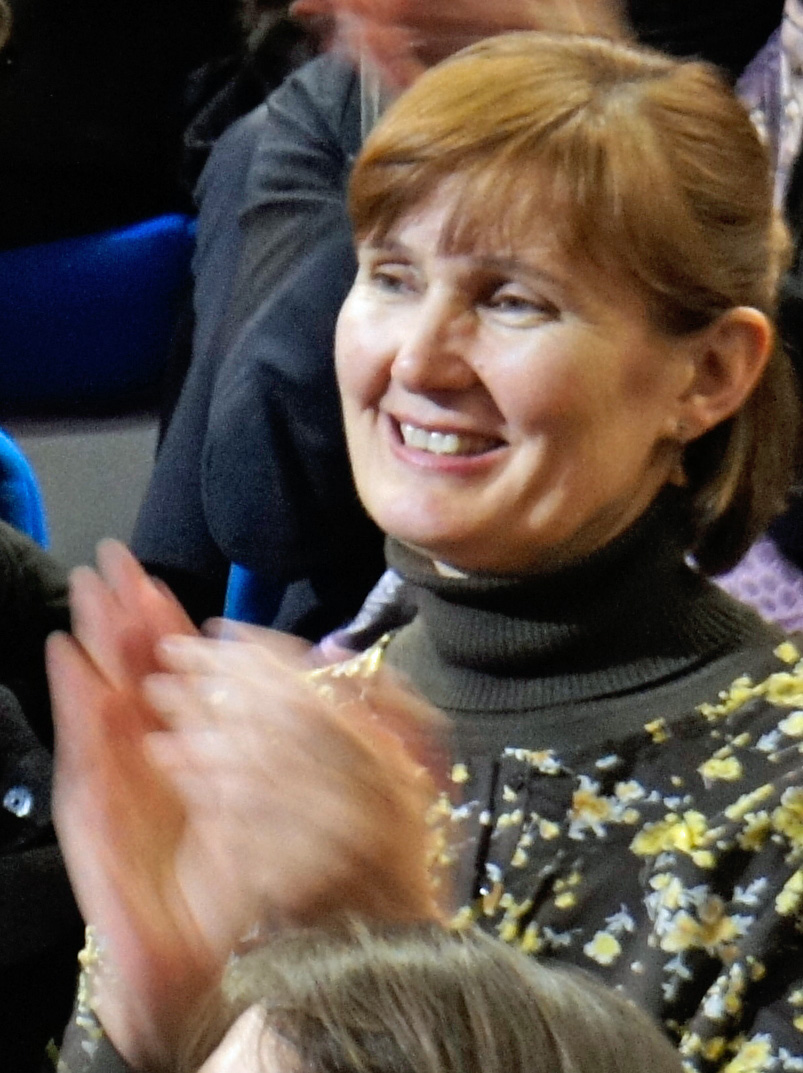 Marie-Hélène Aubert femmes politique françaises.